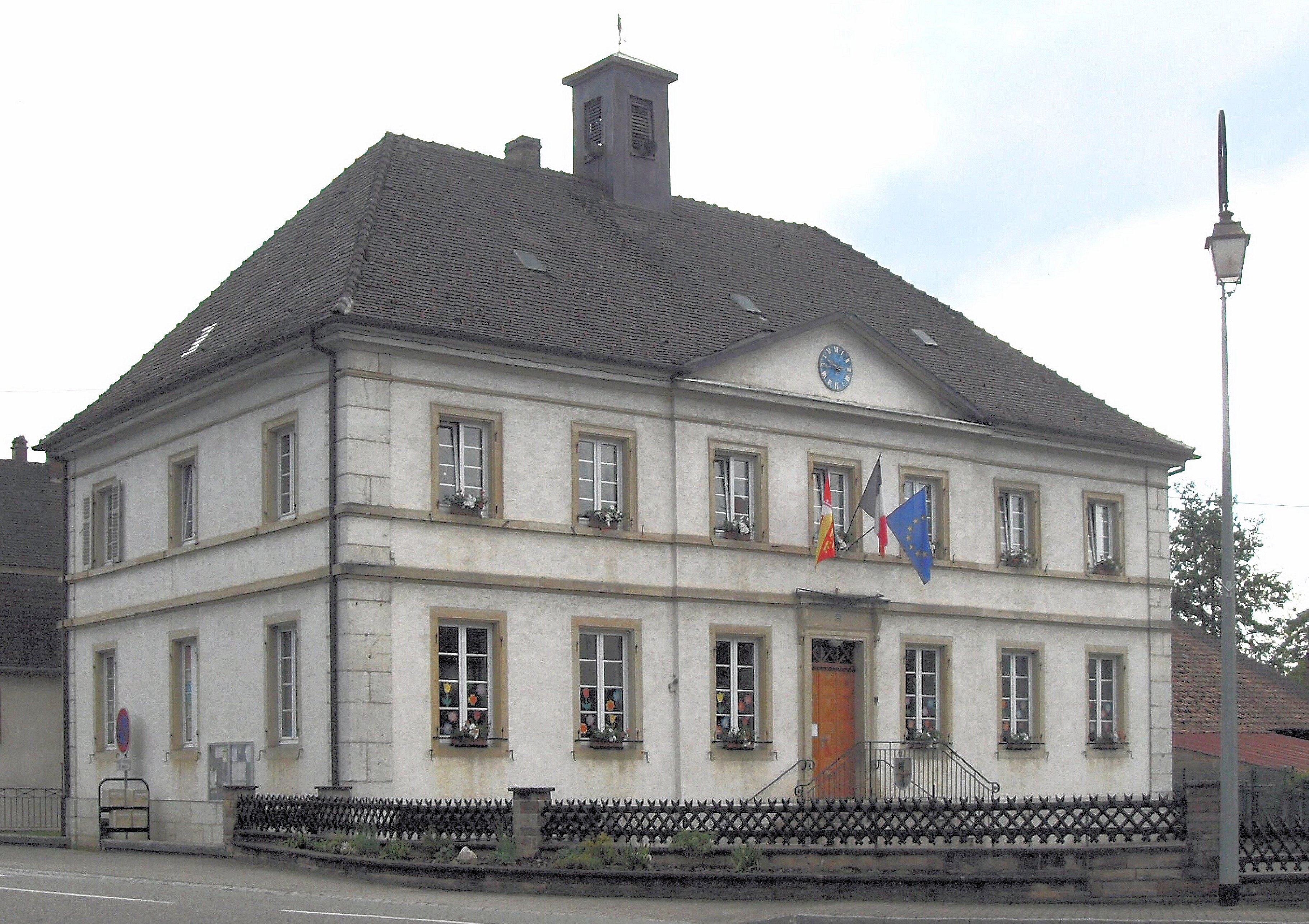 La mairie-école de Durlinsdorf